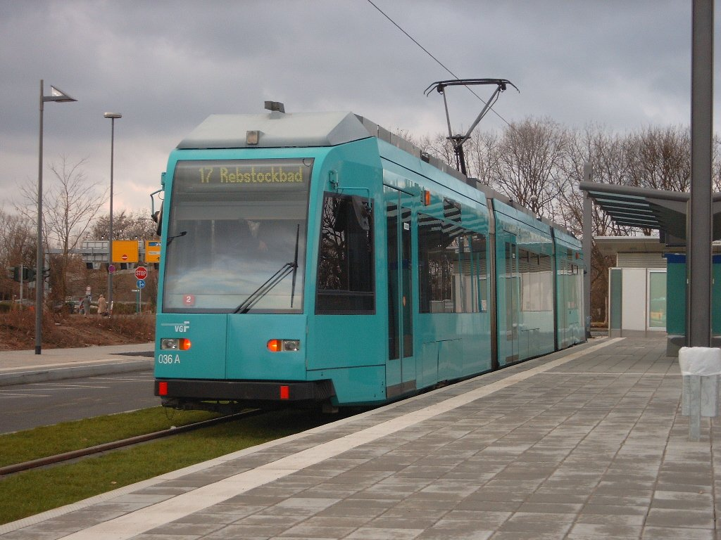 VGF Tramcar R 036 at Rebstockbad, Frankfurt am Main, December 22, 2003. Picture by myself, GNU-FDL. VGF-Straßenbahnwagen R 036 an der Haltestelle Rebstockbad, Frankfurt am Main, 22. Dezember 2003. Selbst fotografiert, GNU-FDL.